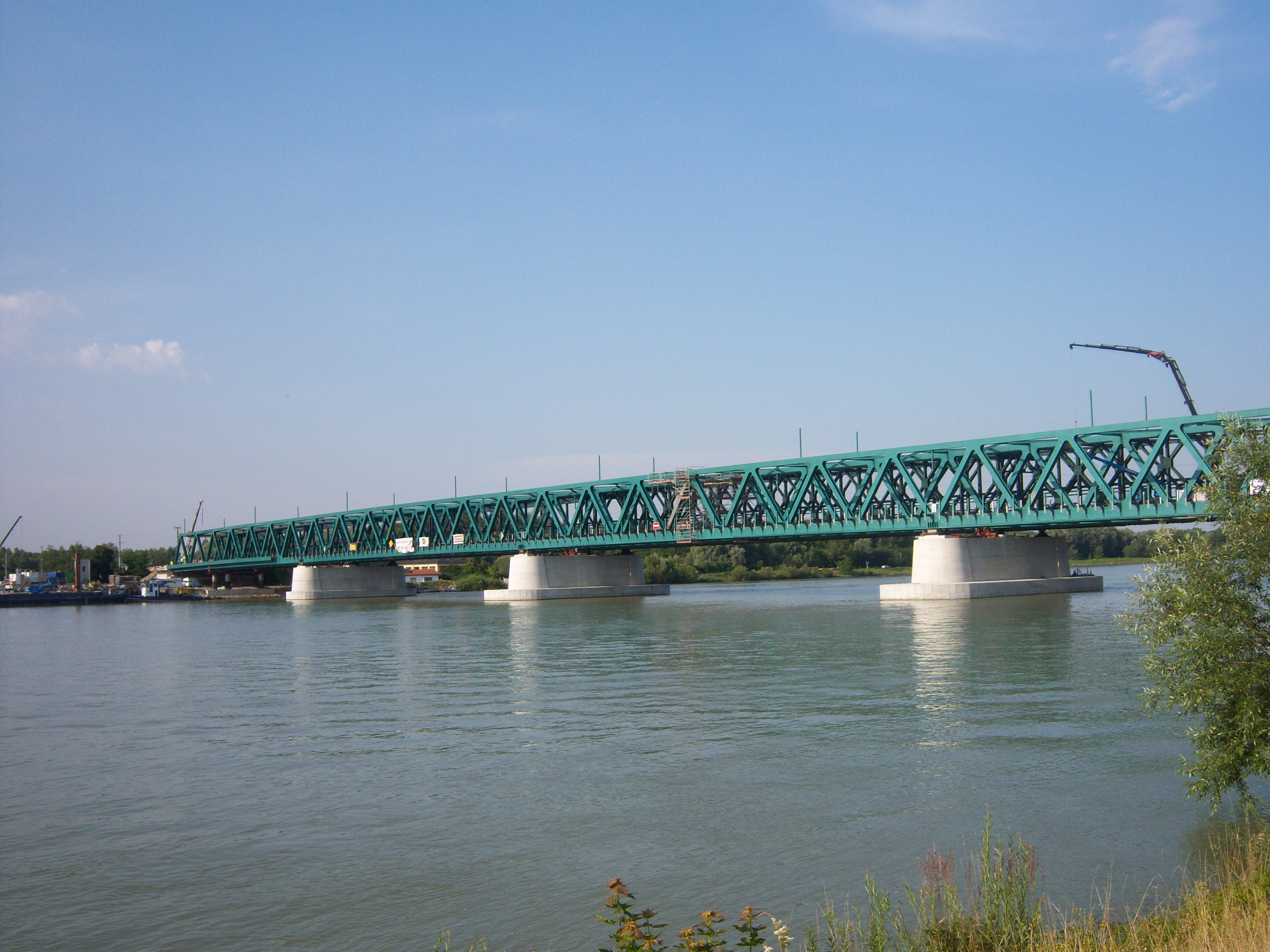 Donaubrücke Tulln